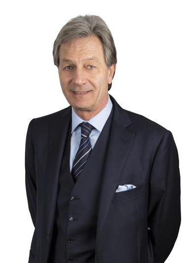 Gerhard Brandstätter, Rechtsanwalt aus Bozen/Südtirol und Honorar-Konsul der Bundesrepublik Deutschland